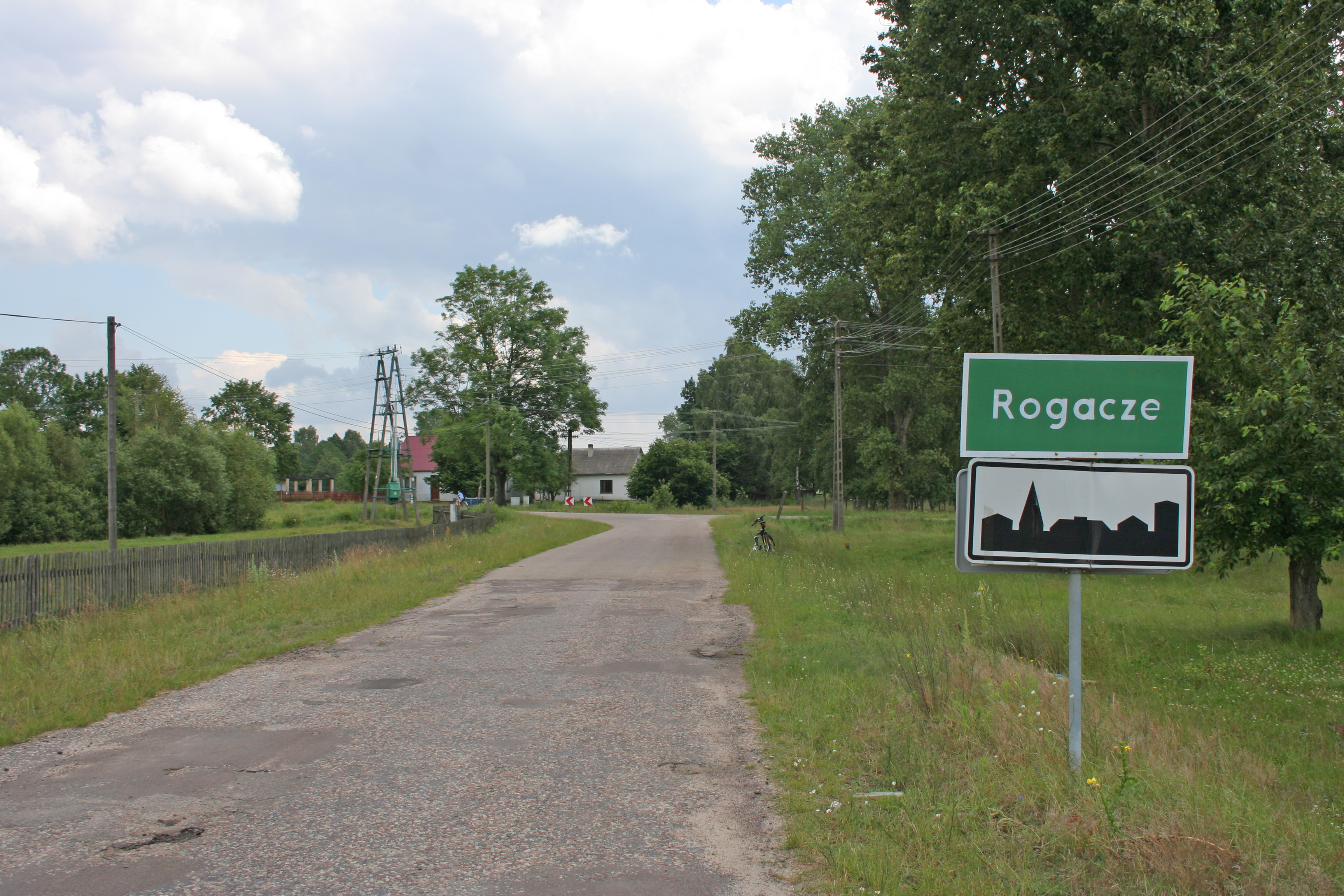 Droga wjazdowa do Rogacz.